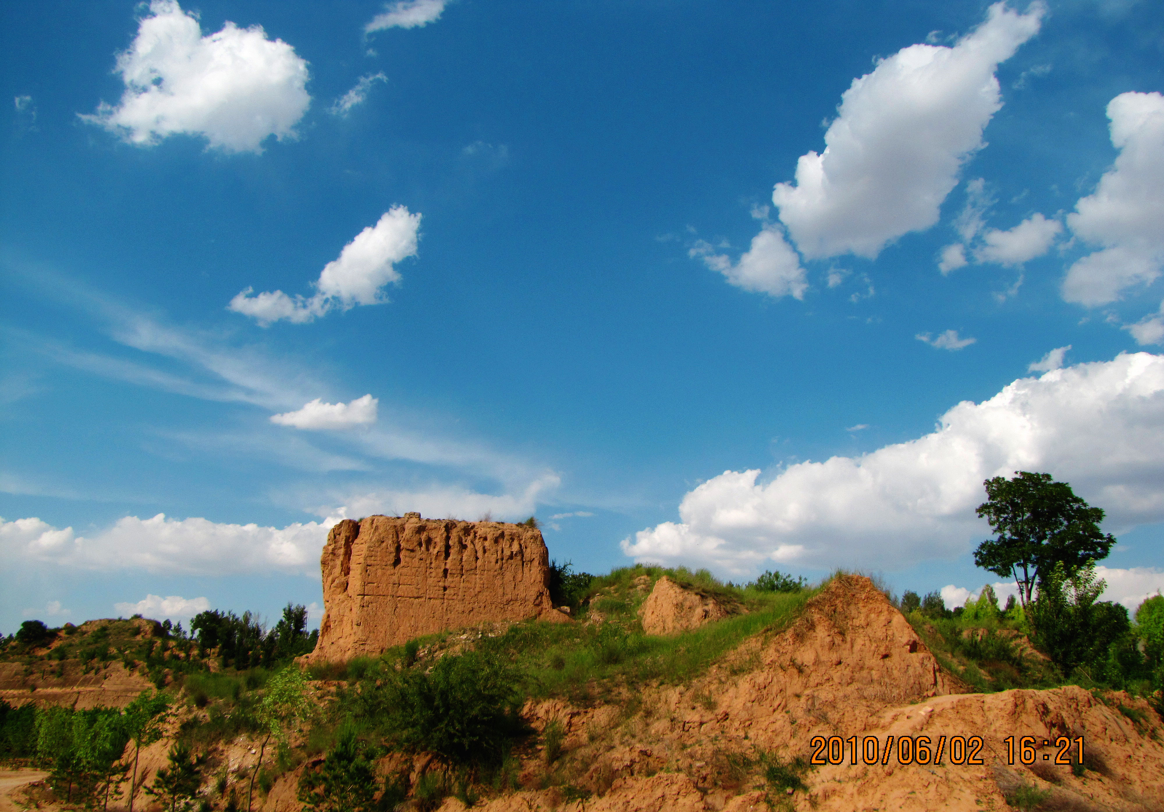 长城烽火台（明--榆林段）